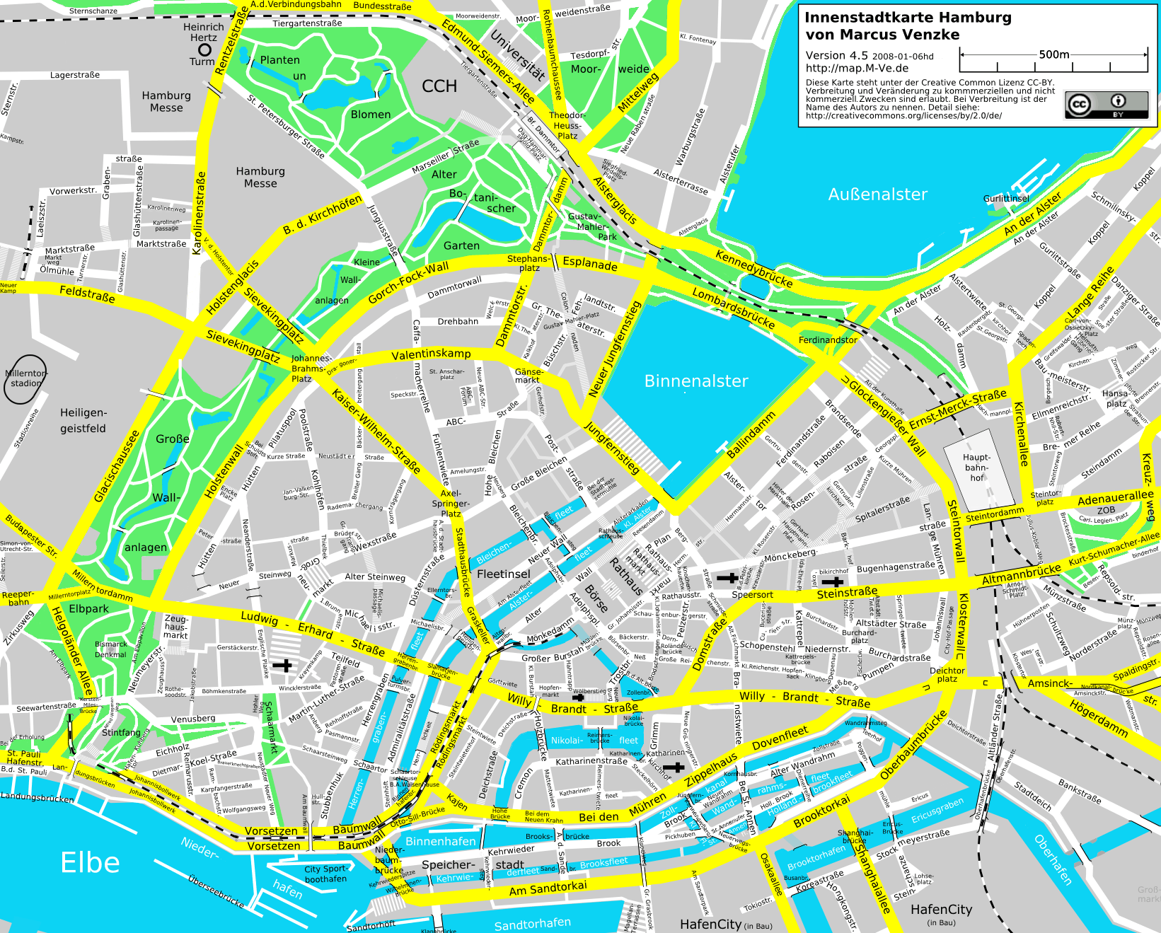 Karte der Innenstadt Hamburgs. Map of central Hamburg.